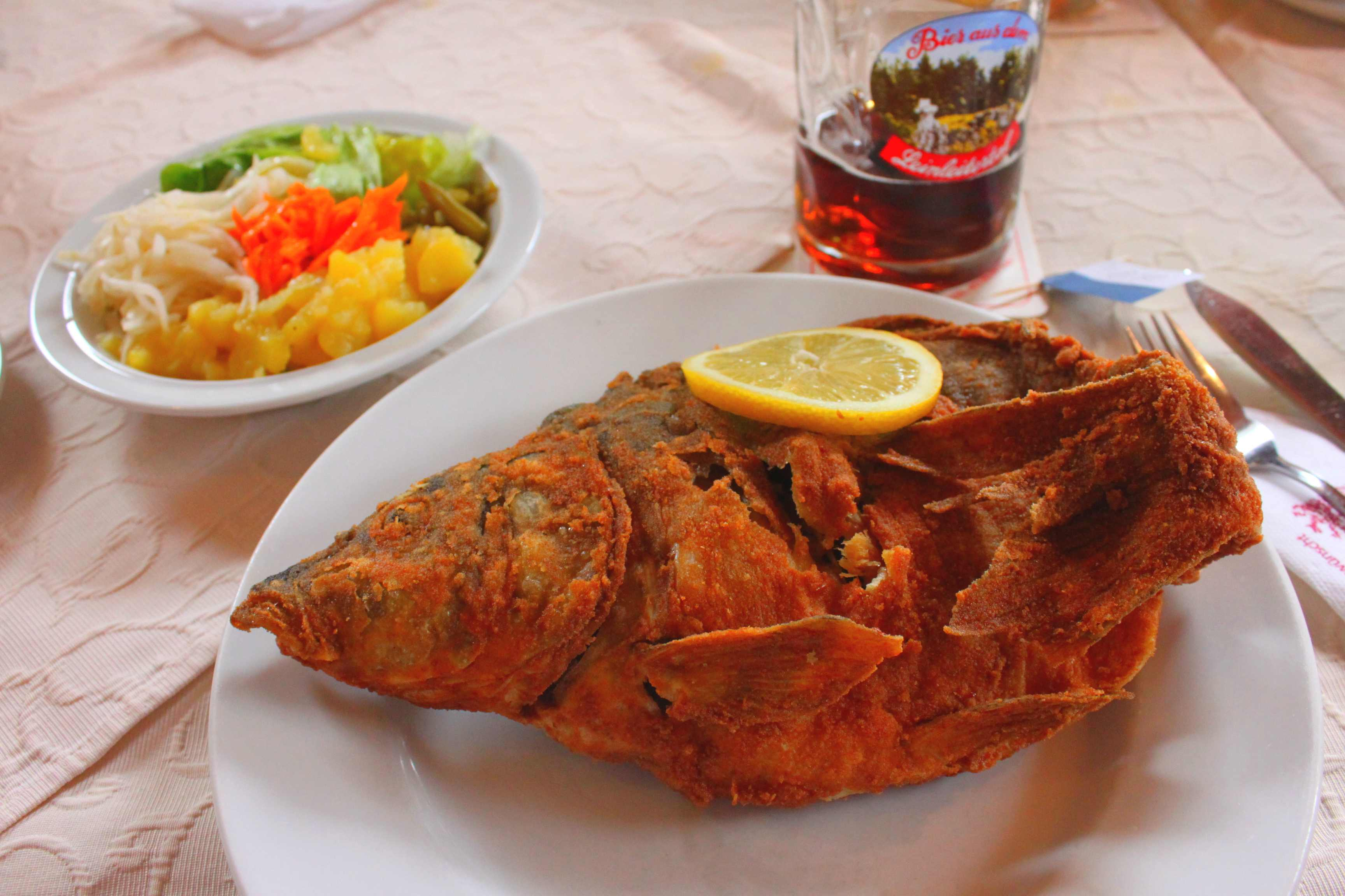 Gebackener Karpfen im Gasthaus Kroder, Schlaifhausen 43, 91369 Wiesenthau.